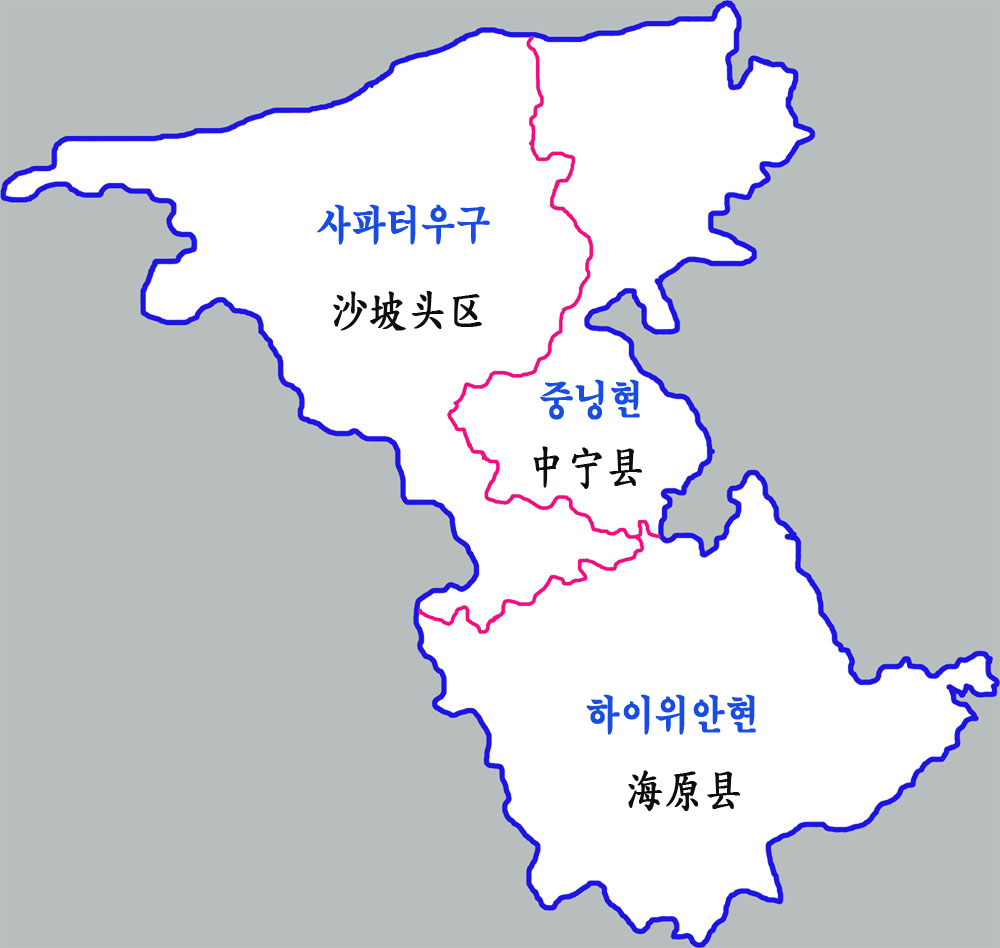 중웨이시 현급구역